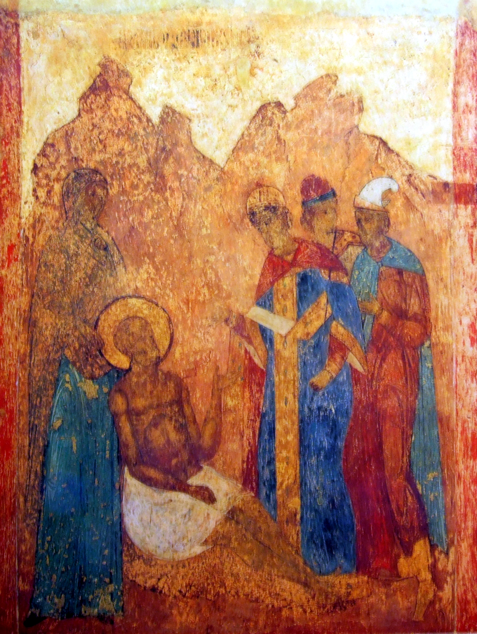 Иов на гноище. Job. 1547-51. Роспись ю-в. стопа Благовещенского собора Кремля